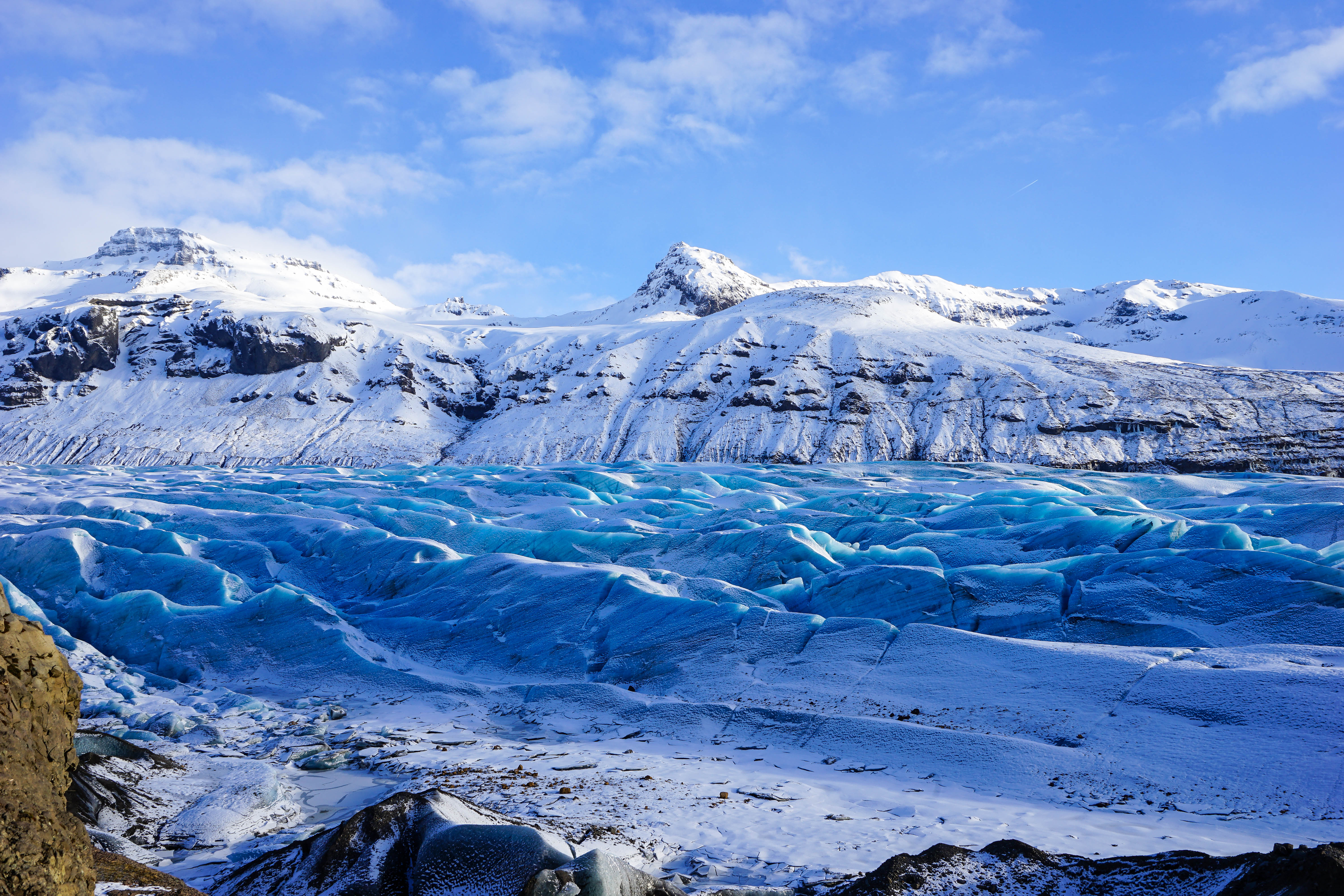 Svínafellsjökull